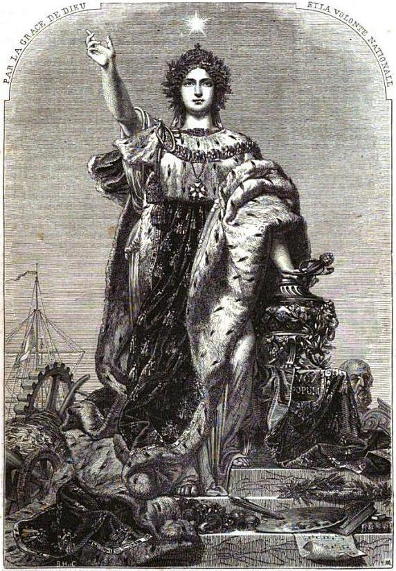 Allégorie du Second Empire (dont le césarisme démocratique est représenté par l'urne du plébiscite et l'inscription vox populi), entourée (de droite à gauche) des symboles des Arts, de l'Agriculture, de l'Armée, de l'Industrie et du Commerce. La légitimité du régime repose sur un mélange de droit divin et de démocratie (« par la grâce de Dieu et la volonté nationale »).